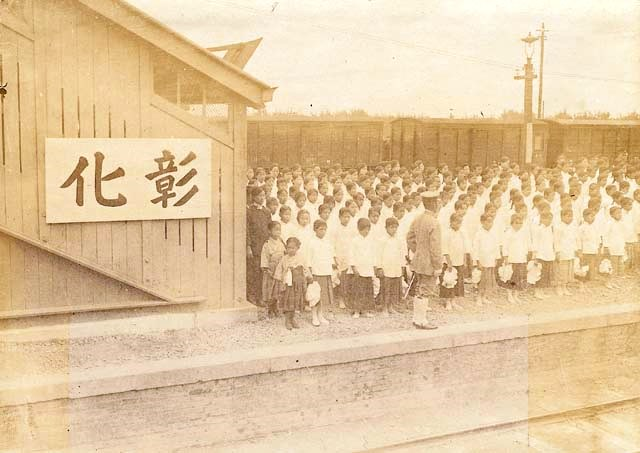 中文（台灣）: 彰化停車場（即今彰化火車站），小學生們身著制服整齊地站在月台上迎接日本裕仁太子到來。